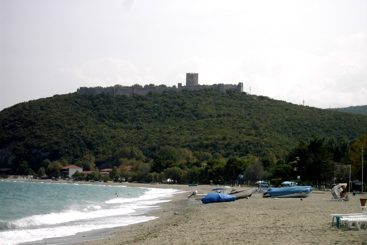 PLATAMONAS